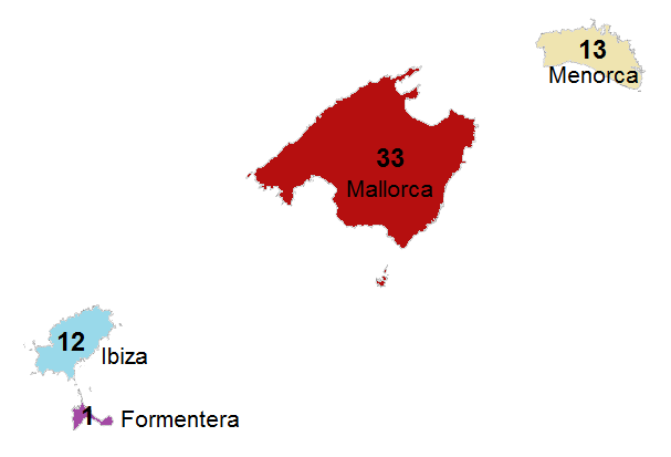 Circunscripciones electorales de las Islas Baleares